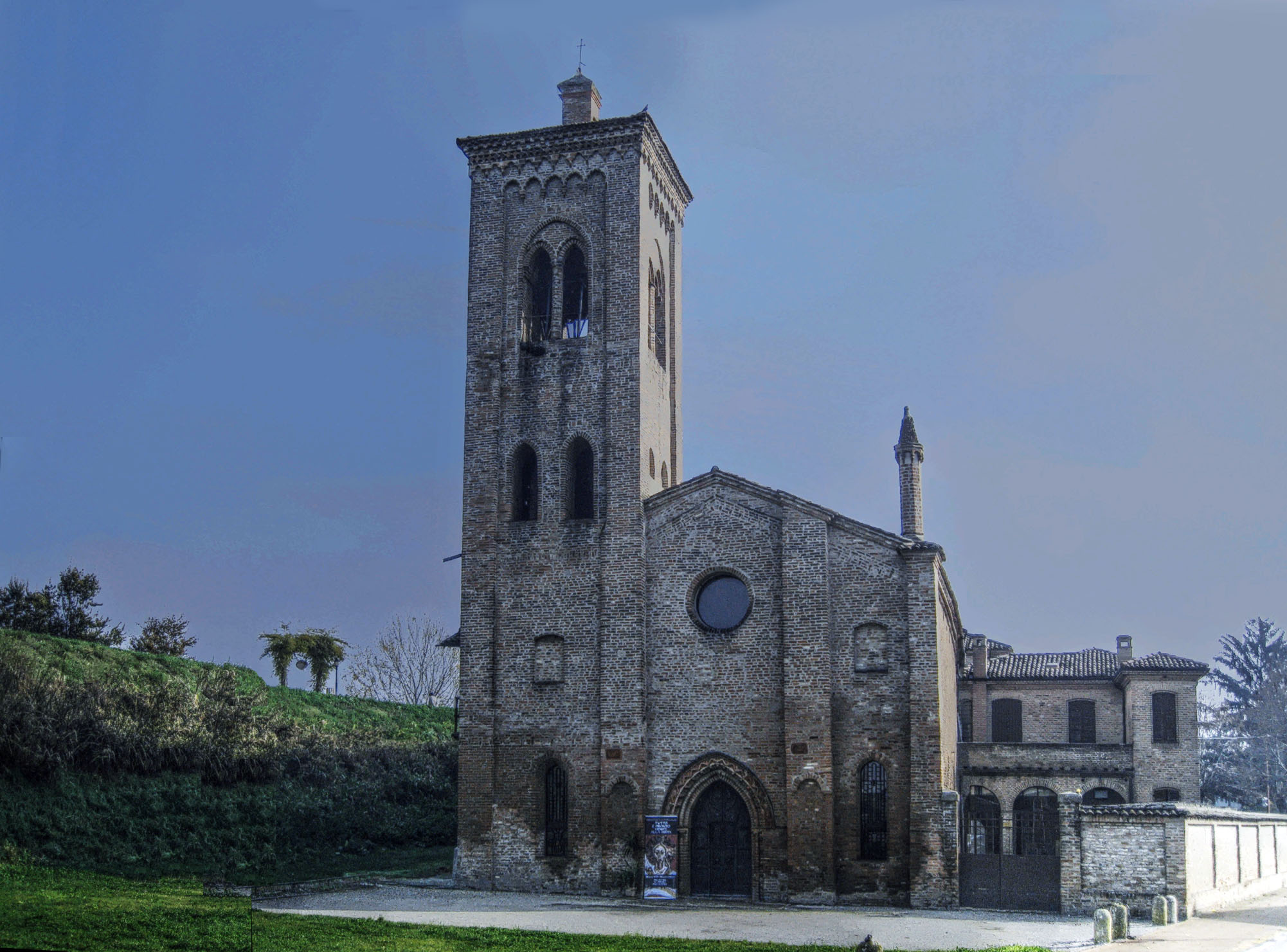 chiesa santa maria assunta